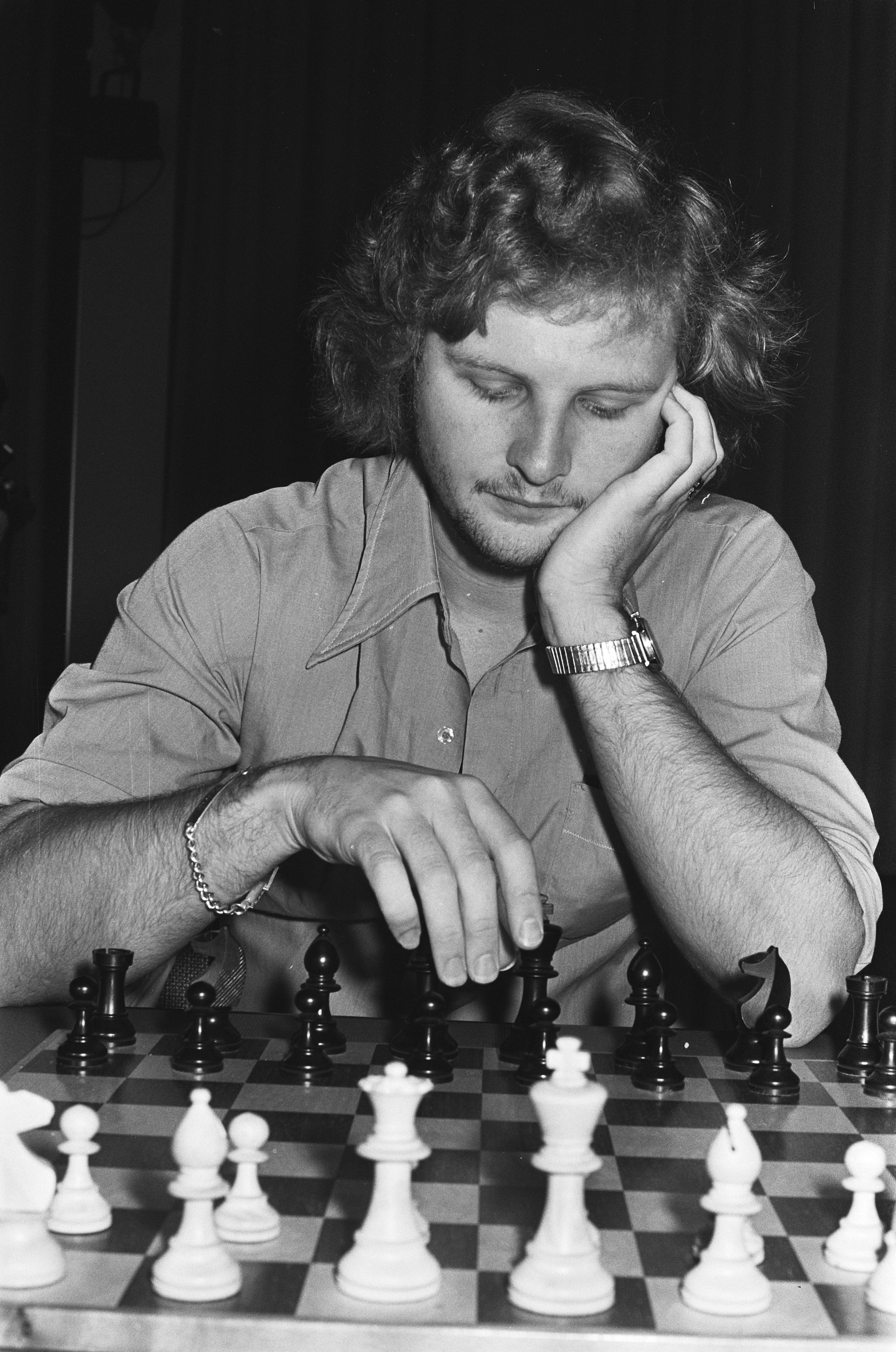 IBM-schaaktoernooi 1977, laatste ronde; Miles aan zet (close).